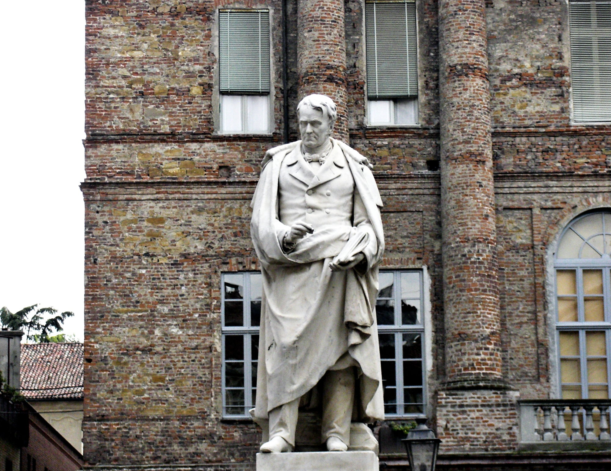 Benedetto Cacciatori, Statua di Luigi Canina, 1865, Piazza Santo Stefano, Casale Monferrato.